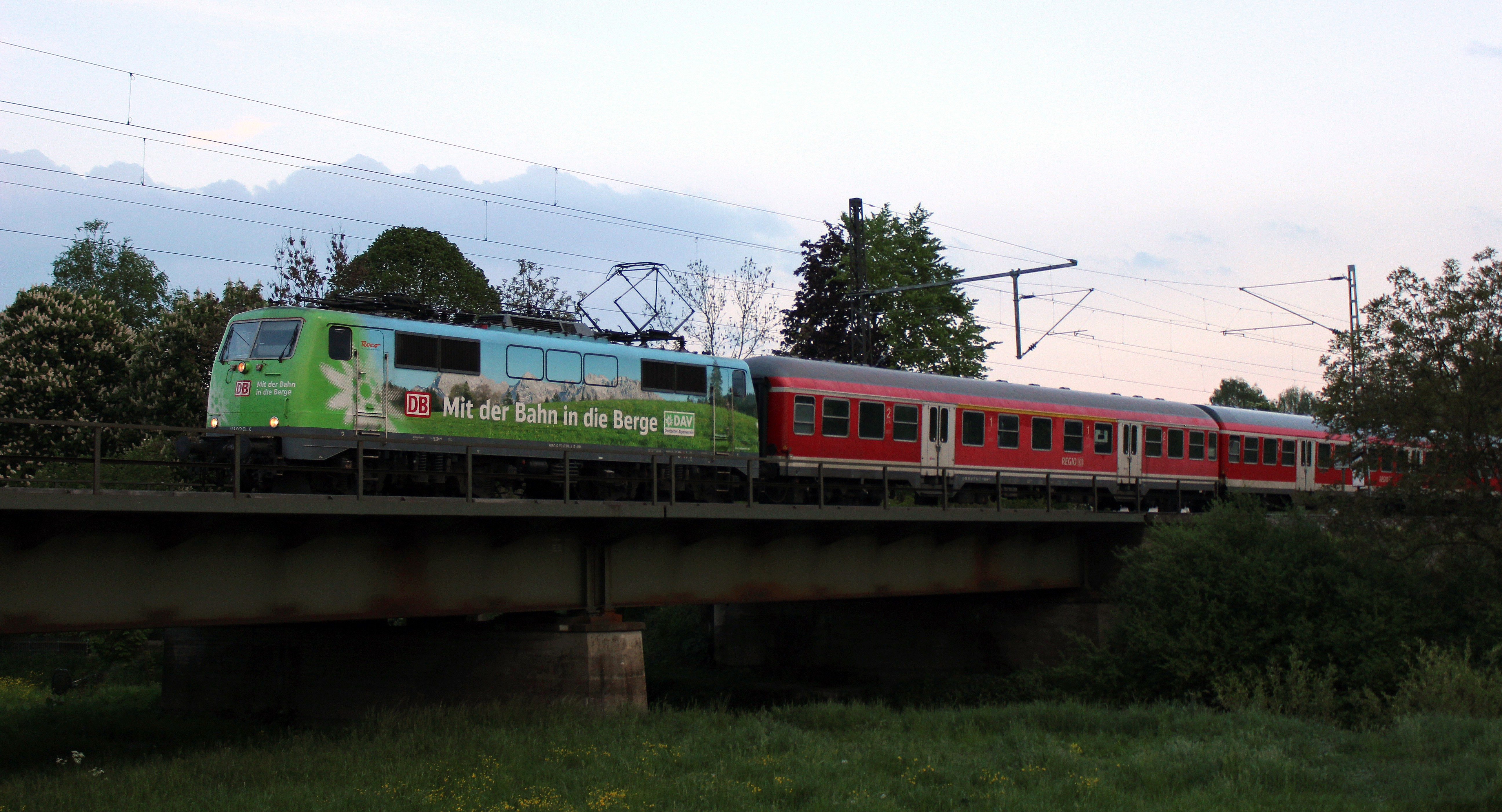 Hier fährt gerade der RE von Augsburg Hbf nach Nürnberg Hbf in Donauwörth ein. Gezogen werden die n-Wagen von einer BR 111 mit Werbelackierung "Mit der Bahn in die Berge" vom Deutschen Aplenverein. Aufgenommen am späten Nachmittag des 01. Mai 2014.